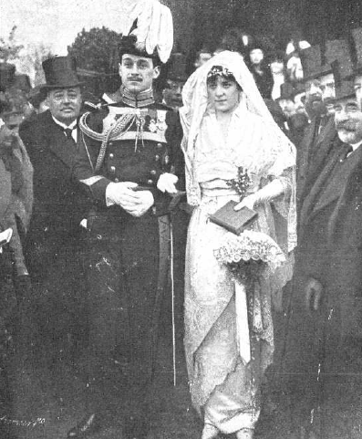 Fotografía tomada en la boda de la IX condesa de Quintanilla con Luis de Figueroa y Alonso Martínez, hijo del conde de Romanones.